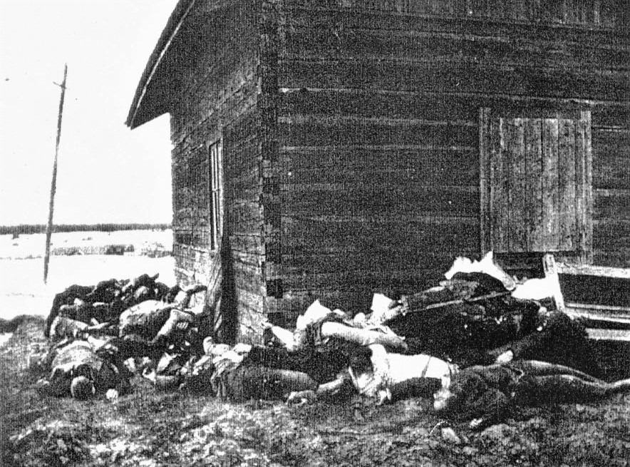 Kyröskosken taistelun kaatuneita punaisia kasattu aitan nurkalle.